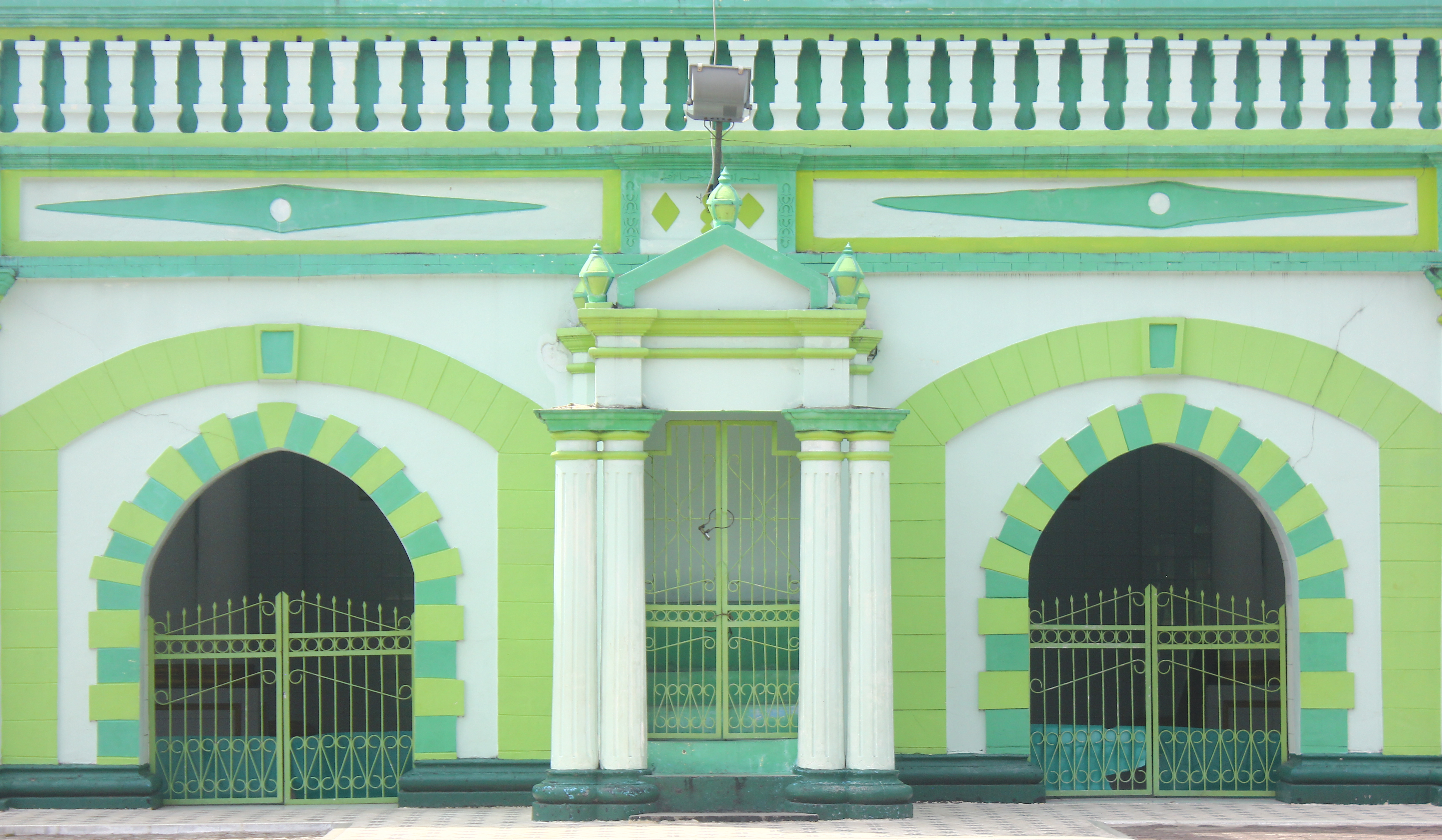 Masjid Raya Ganting di Kota Padang, Sumatra Barat, Indonesia.